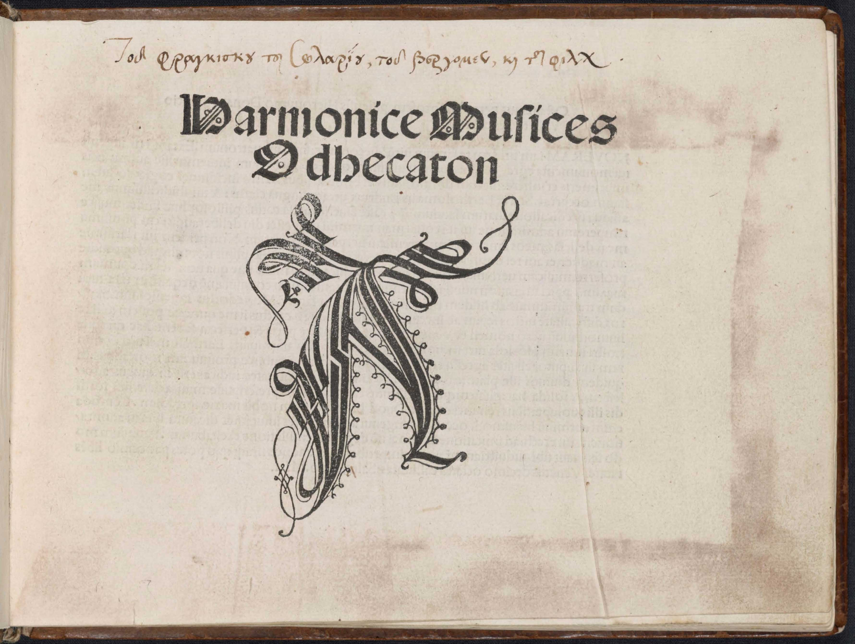 Front page of the first printed collection of music